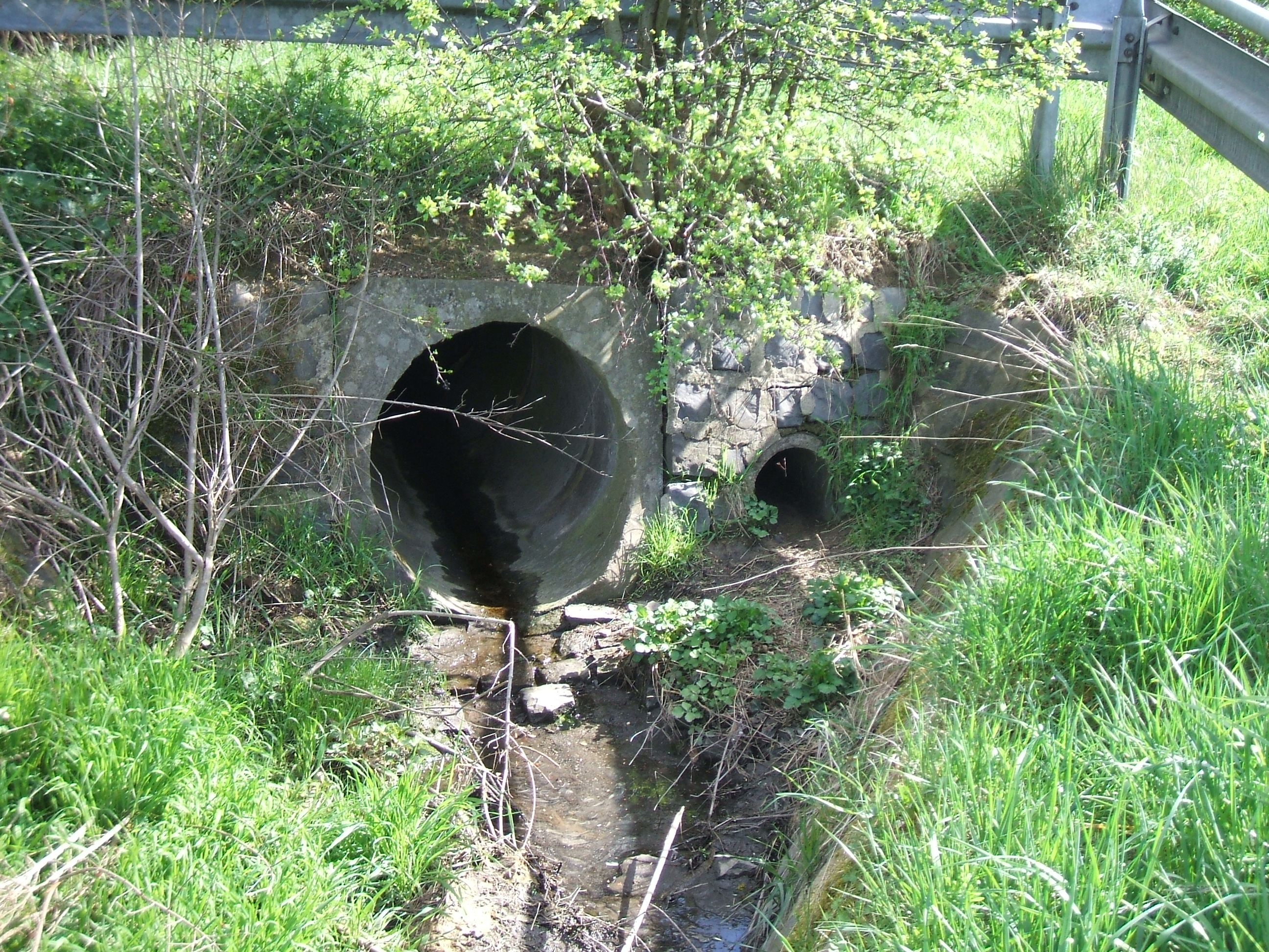 Der Blüßengraben tritt per Durchlass unter der A 5 wieder zu Tage auf ein mit Rasengittersteinen befestigtes Bett, neben einem anderen Auslass